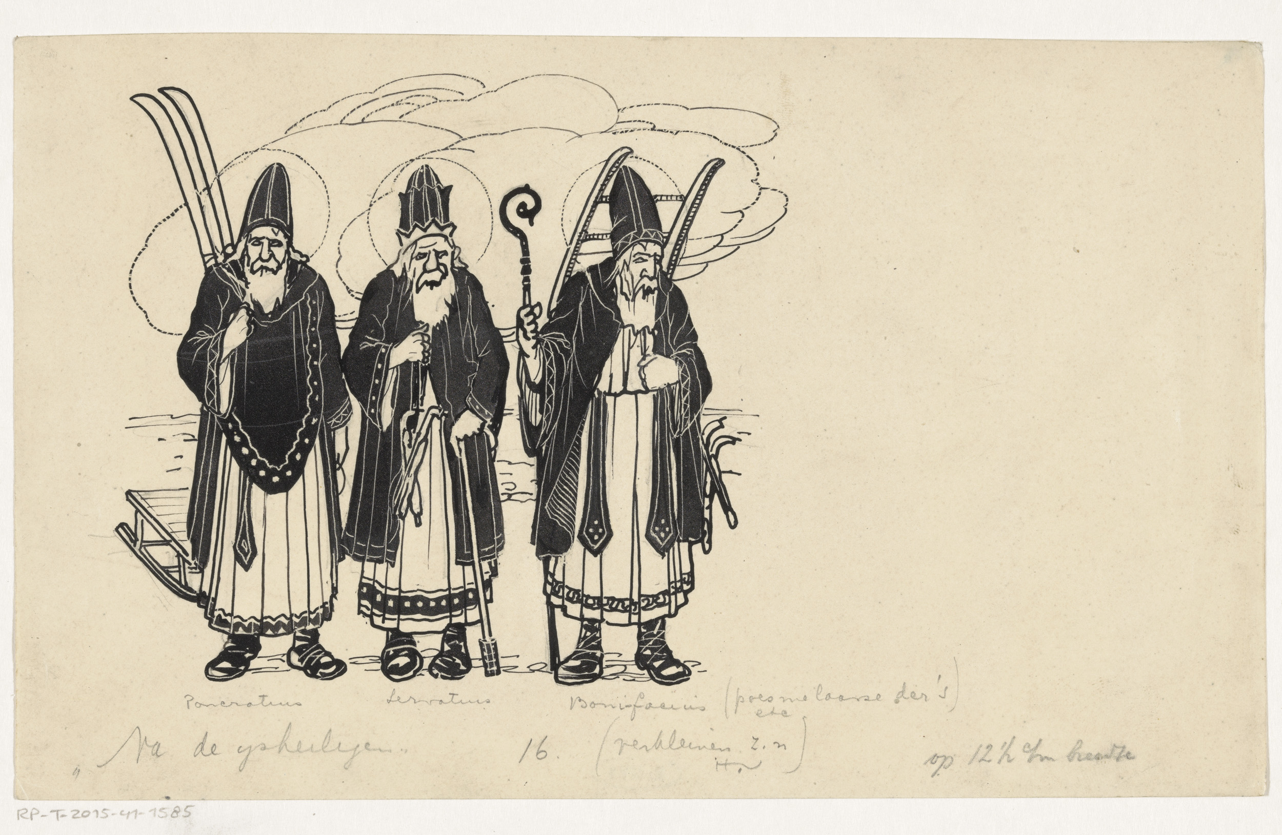 IdentificatieTitel(s): IJsheiligenObjecttype: tekening boekillustratie (ontwerp) Objectnummer: RP-T-2015-41-1585Opschriften / Merken: annotatie, recto, handgeschreven: ‘Pancrattius Servatius Bonifacius (poes me laarze der 's)/ "Na de ijsheiligen" 16’clichéaanwijzing, recto en verso, handgeschrevenverzamelaarsmerk, verso, gestempeld: Lugt 2228Omschrijving: Sint Pancratius, Sint Servatius en Sint Bonifatius, allen met een baard, staan op een rij. Ze dragen een staf, stok, ski's en een slee.VervaardigingVervaardiger: tekenaar: Henri VerstijnenDatering: 1892 - 1940Fysieke kenmerken: pen en penseel in zwart over potloodMateriaal: papier inkt potlood Techniek: pen / penseelAfmetingen: h 152 mm × b 250 mmOnderwerpWat: the martyr Pancras (Pancratius) of Rome; possible attributes: swordServatius, bishop of Tongeren and Maastricht; possible attributes: clog (wooden shoe), dragon, eagle, keythe martyr Boniface, 'apostle of Germany', and archbishop of Mainz; possible attributes: axe in root of tree, book pierced by a sword, fountain (springing up from under his staff), whipsledge, sleigh (winter sports)Verwerving en rechtenCredit line: Schenking van Uitgeverij L.J. VeenVerwerving: schenking 1970Copyright: Publiek domein